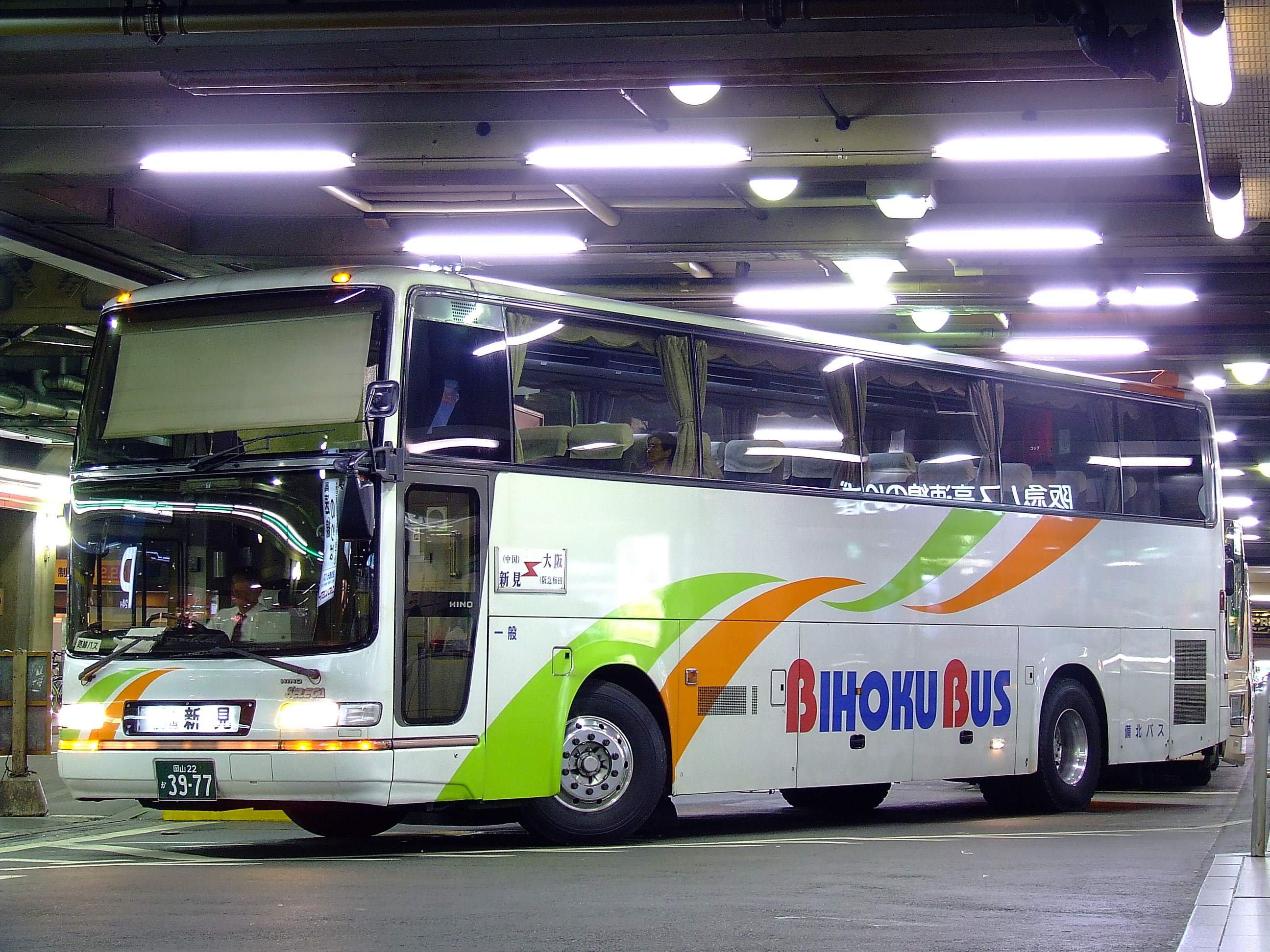 備北バスの高速バス大阪～新見線 大阪梅田阪急三番街BTにて